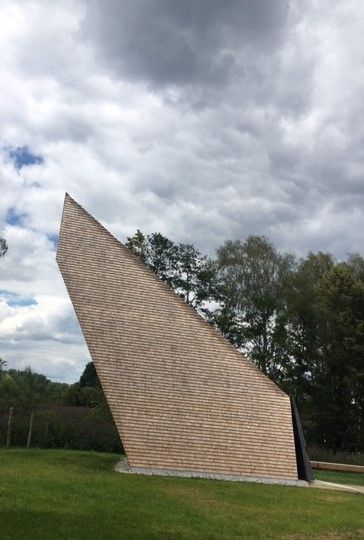 Kapelle bei der Ludwigsschwaige